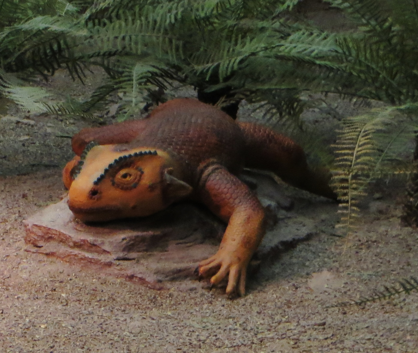 Model of procolophonid- Took the picture at Museum am Lowentor, Stuttgart